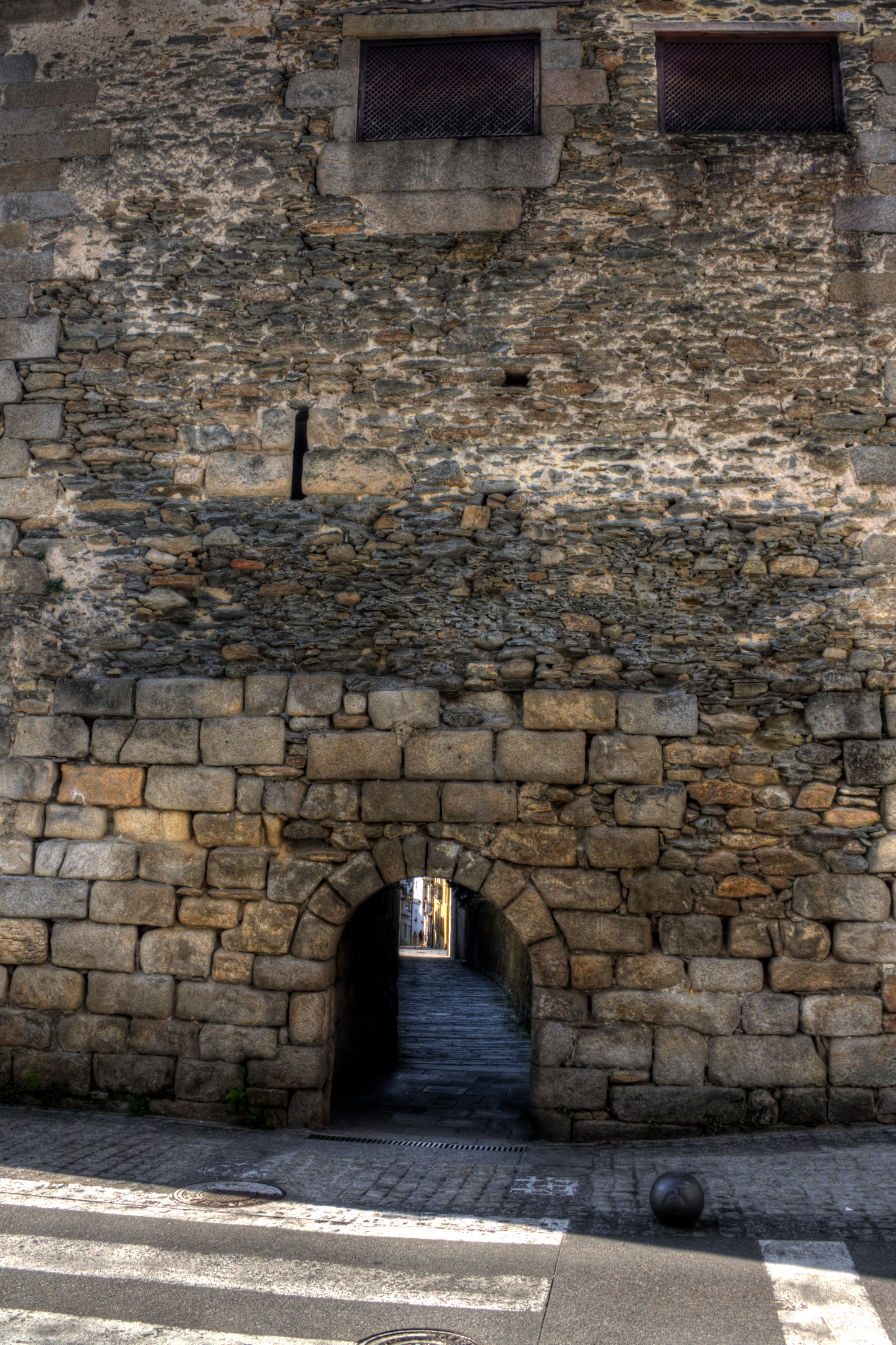 Viveiro, Porta do valado